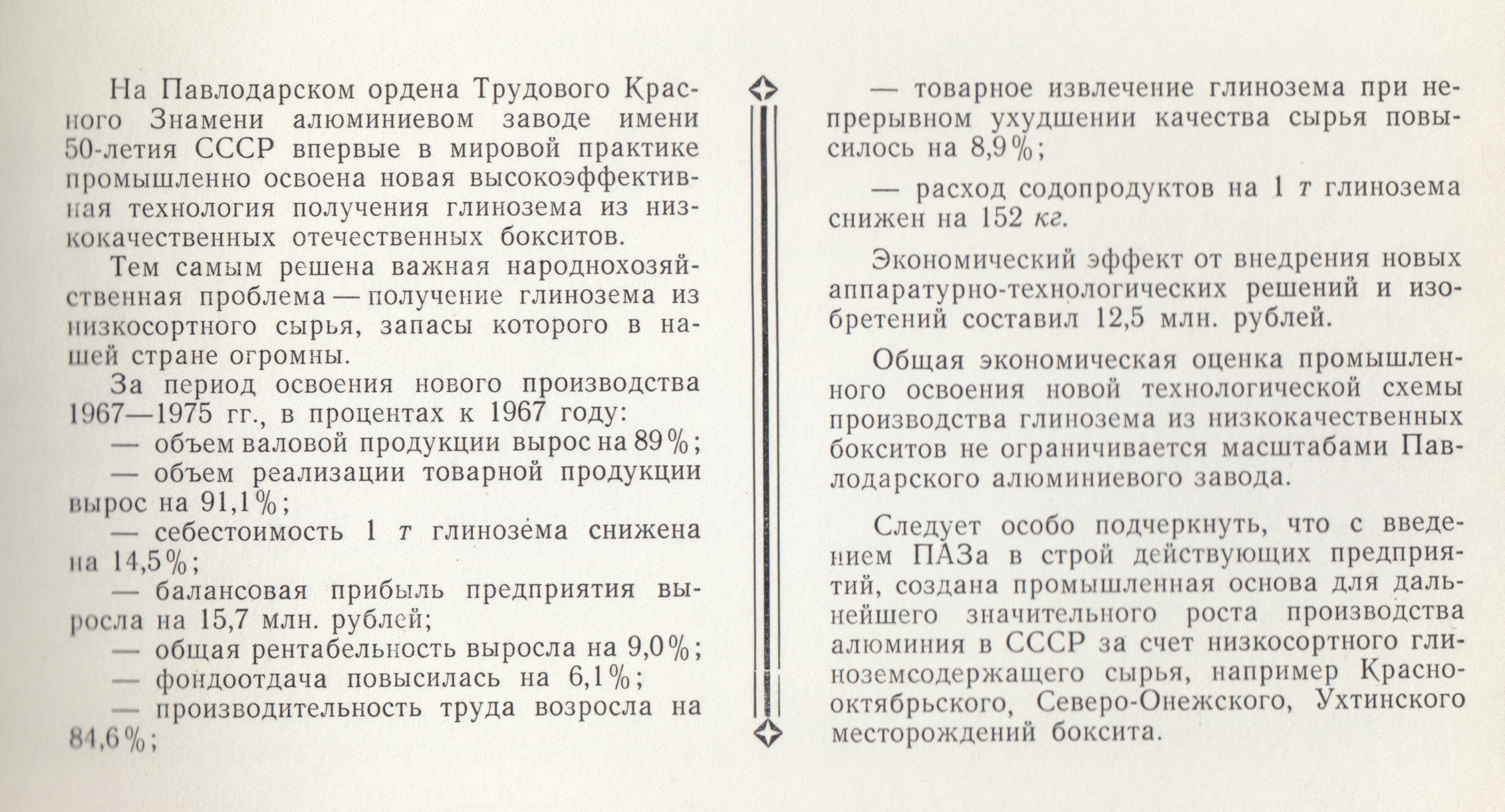 Описание результатов внедрения изобретений на Павлодарском алюминиевом заводе